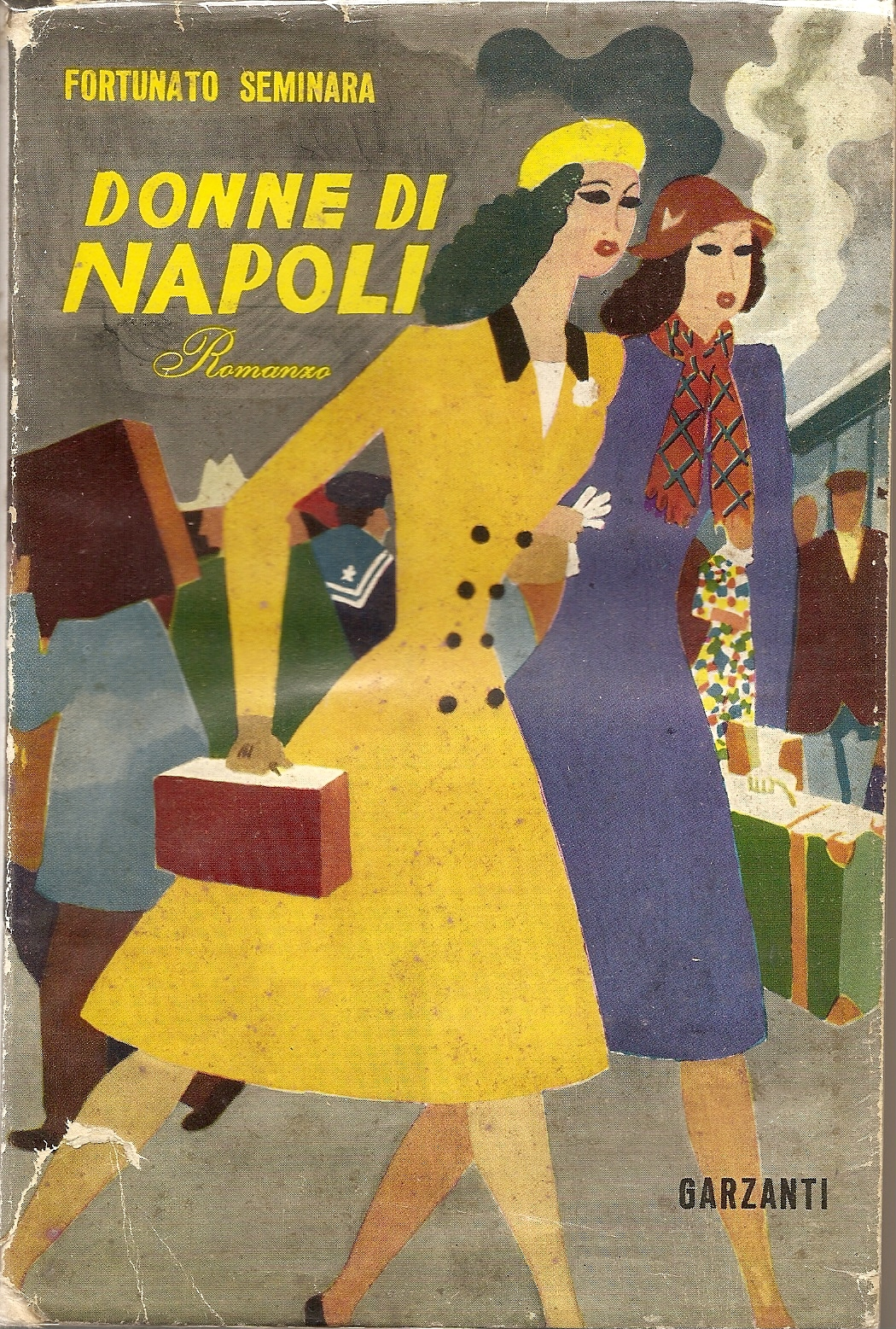 Copertina di "Donne di Napoli" Fortunato Seminara, Milano Garzanti 1953